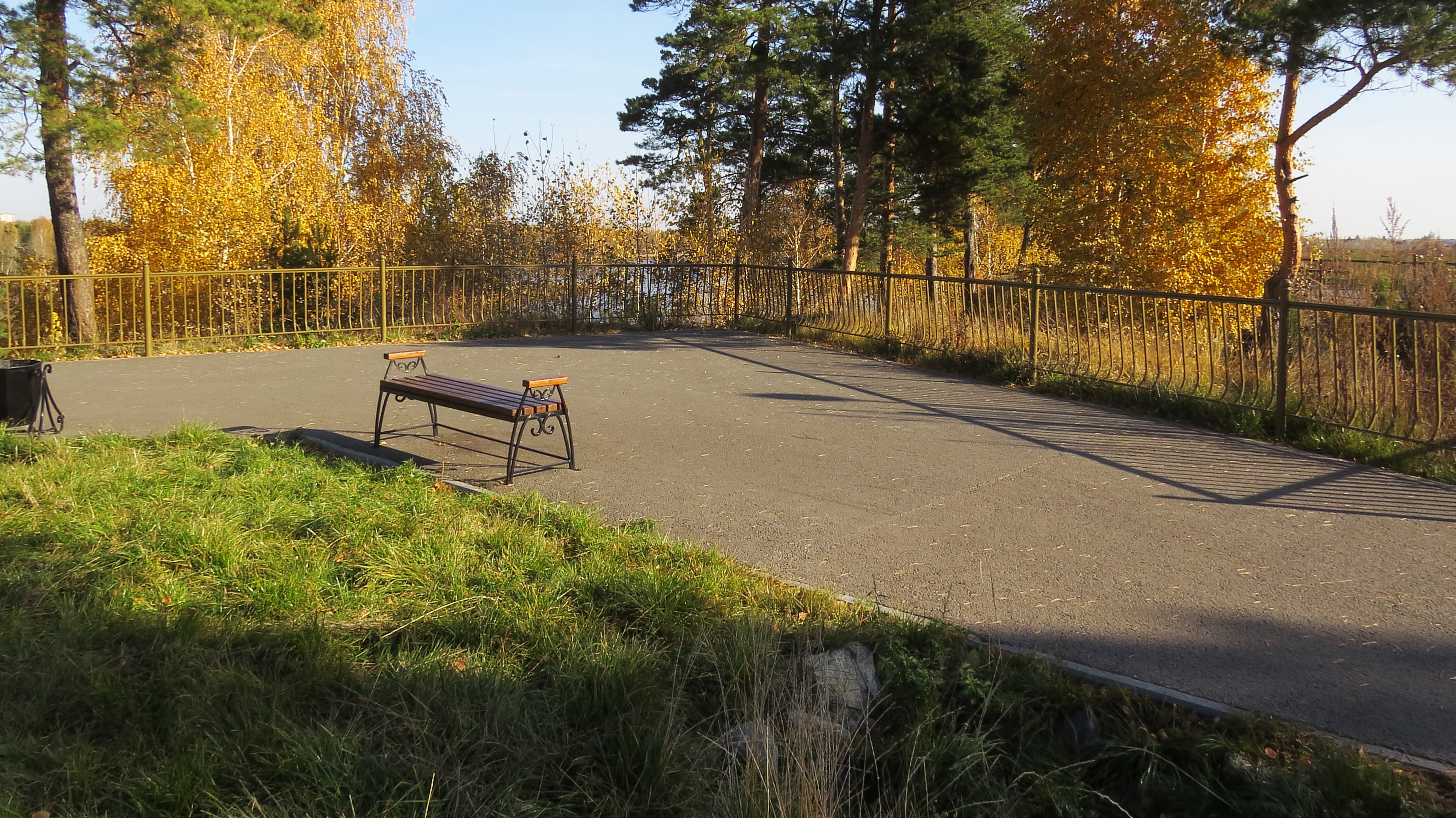 Гилевская роща: Тюмень, Тюменская область This image is related to the protected area of Russia number 7230137